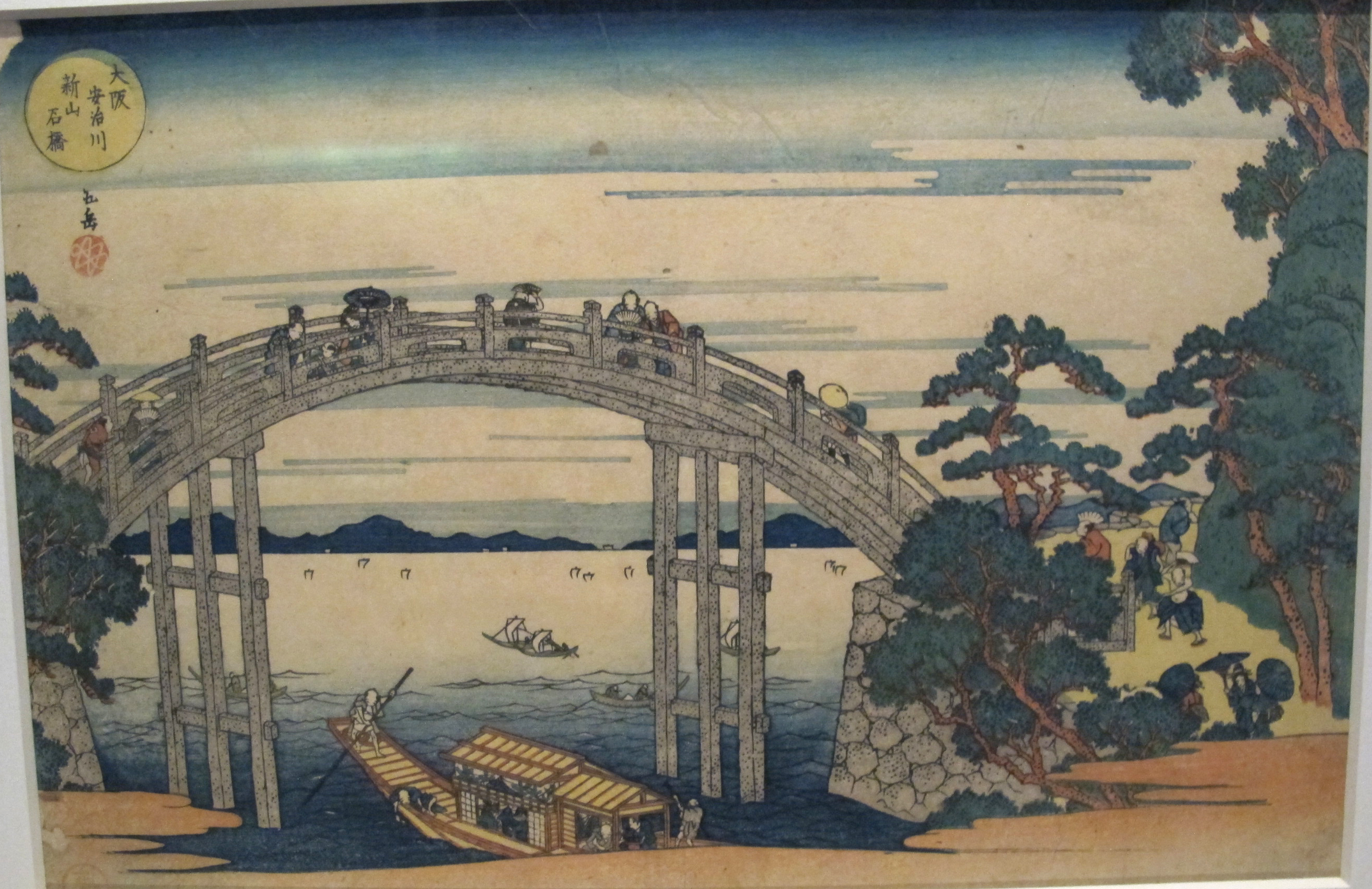 Gakutei harunobu, ponte di pietra sul fiume aji presso il monte tenpo a osaka, XIX sec